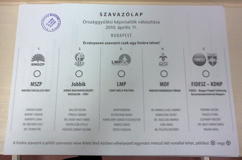 Szavazólap a budapesti listáról a 2010-es országgyűlési választások során